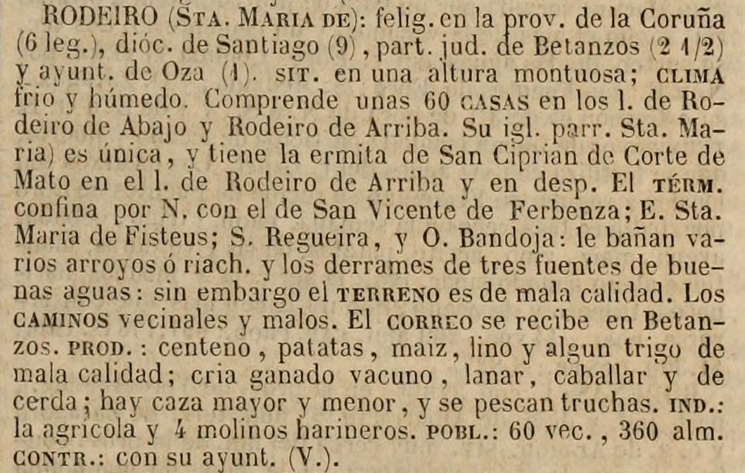 Rodeiro no Diccionario geográfico-estadístico-histórico de España y sus posesiones de Ultramar.